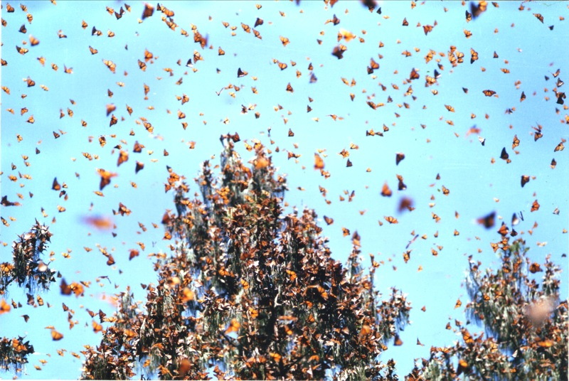 Nuée de monarques préparant leur migration.